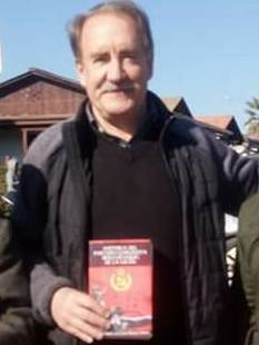 El excandidato presidencial, Eduardo Artés, visita la feria libre de Pichilemu, en junio de 2018.